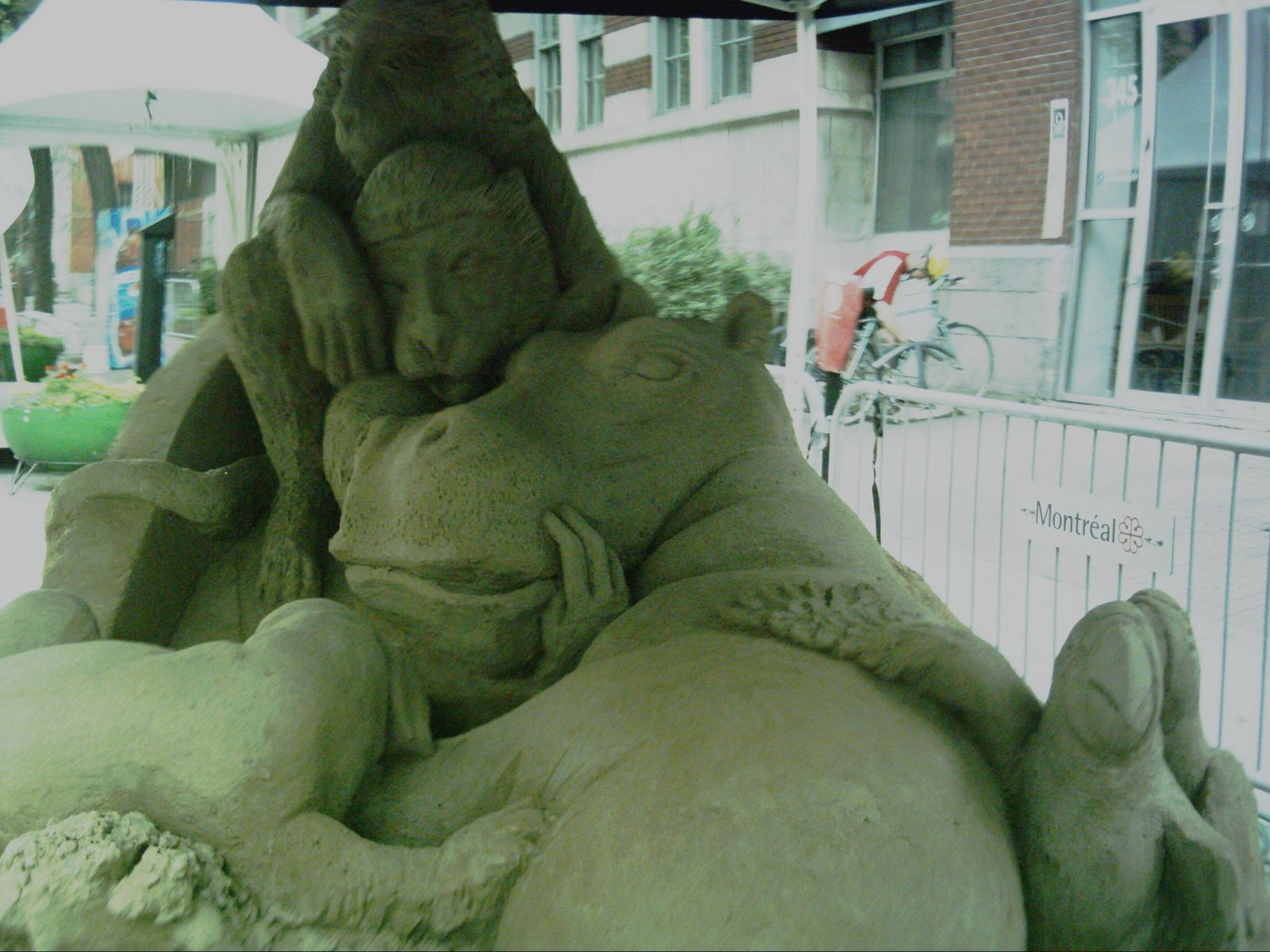 Sculpture de sable sur le thème de l'Arche de Noé. Réalisée à Montréal dans le cadre du Festival Juste pour rire par Oscar Rodriguez (de Barcelone, Espagne).